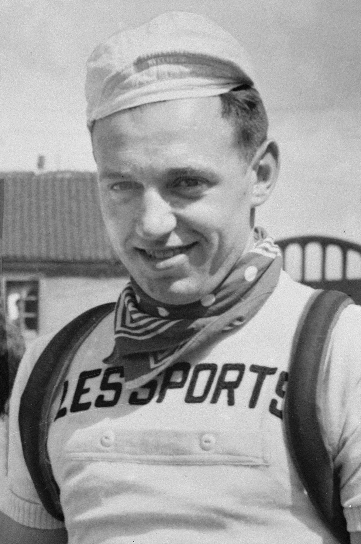 Edgar Sorgeloos